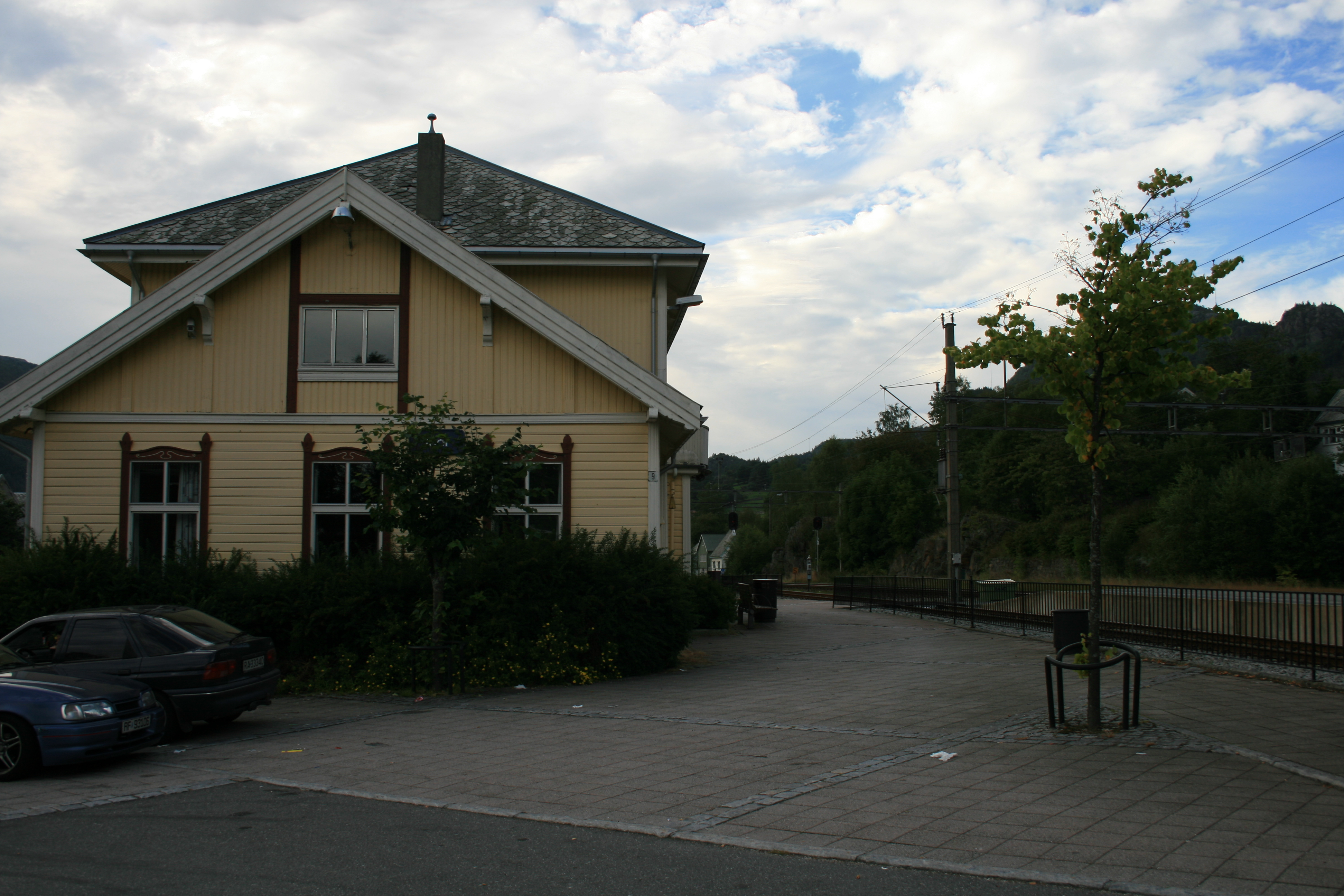 Moi Stasjon